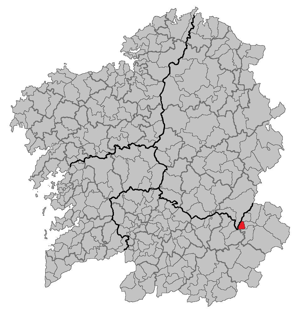 Mapa coa localización do concello de Larouco.